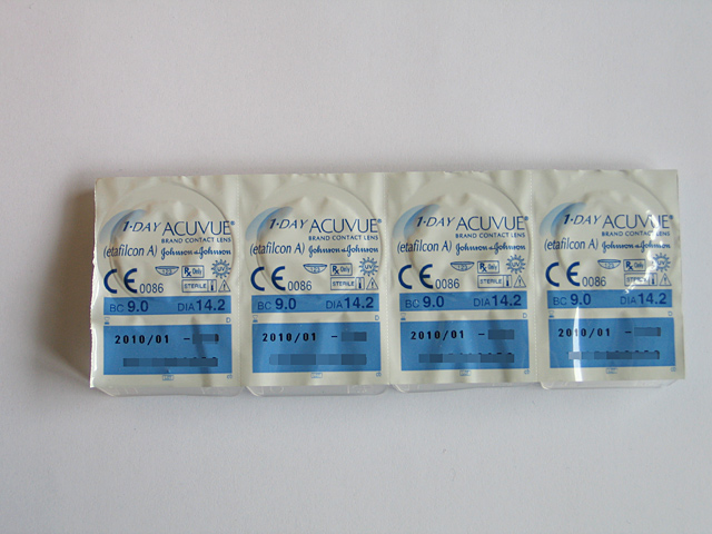 Acuvue (1 day) disposable contact lens